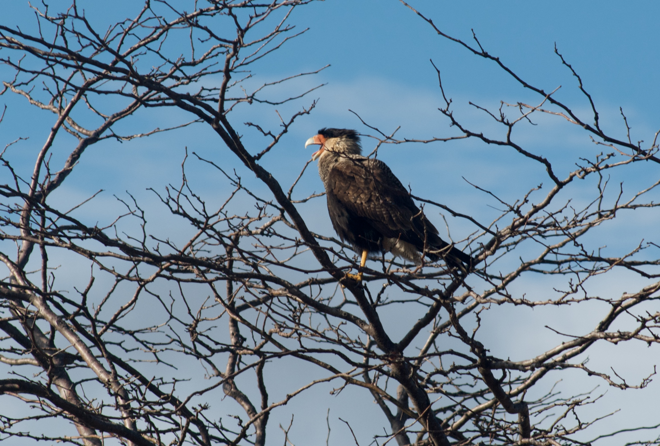 Caracara plancus, Parque Nacional Quebrada del Condorito, Córdoba, Argentina